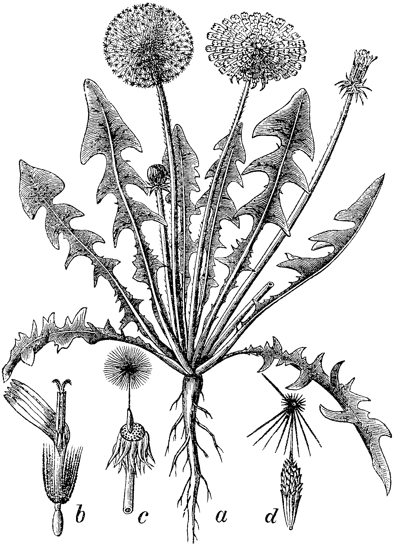 Slika 431. Regrat. (Leóntodon Taráxacum [sic!].)